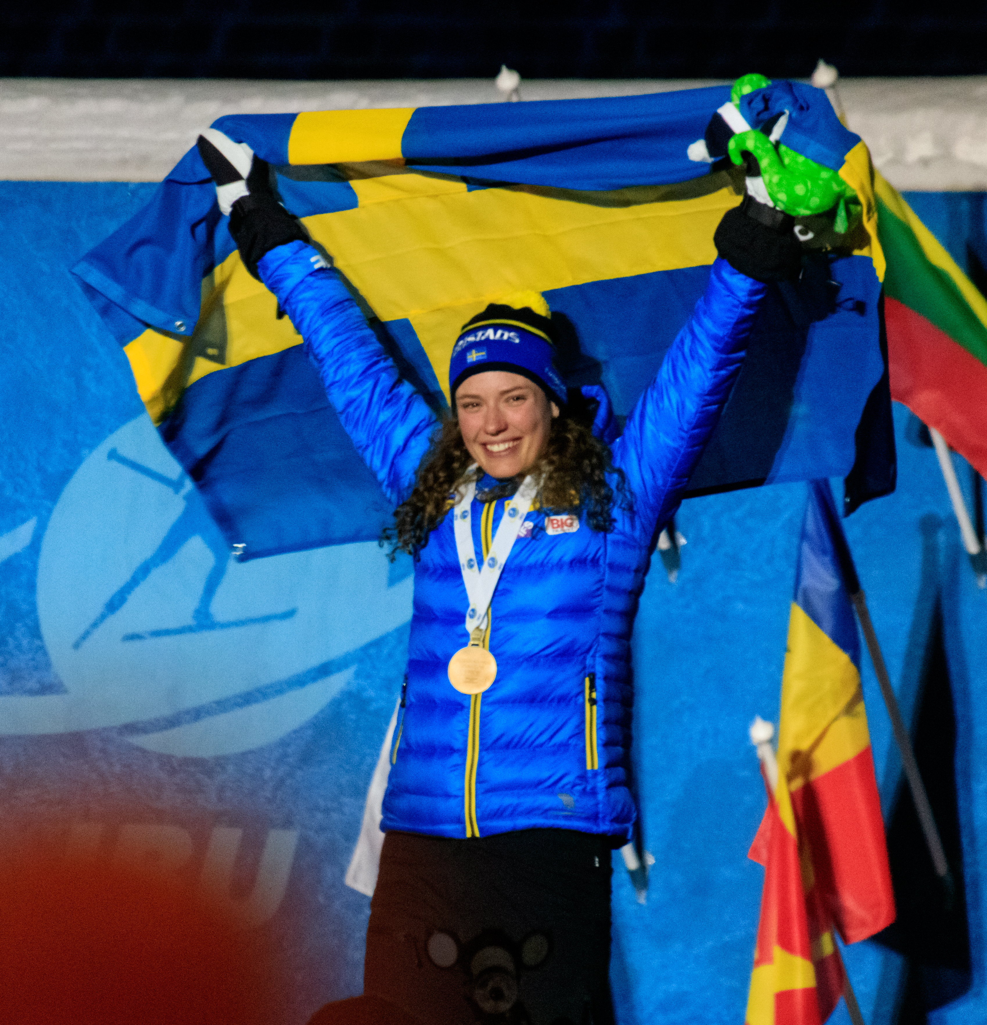 Hanna Öberg med Guldmedaljen efter 15km distans vid VM i Östersund 2019